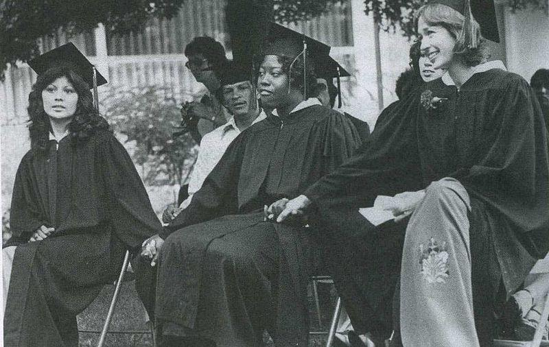 Imagen del día de la graduación del colegio César Chávez, 1977.